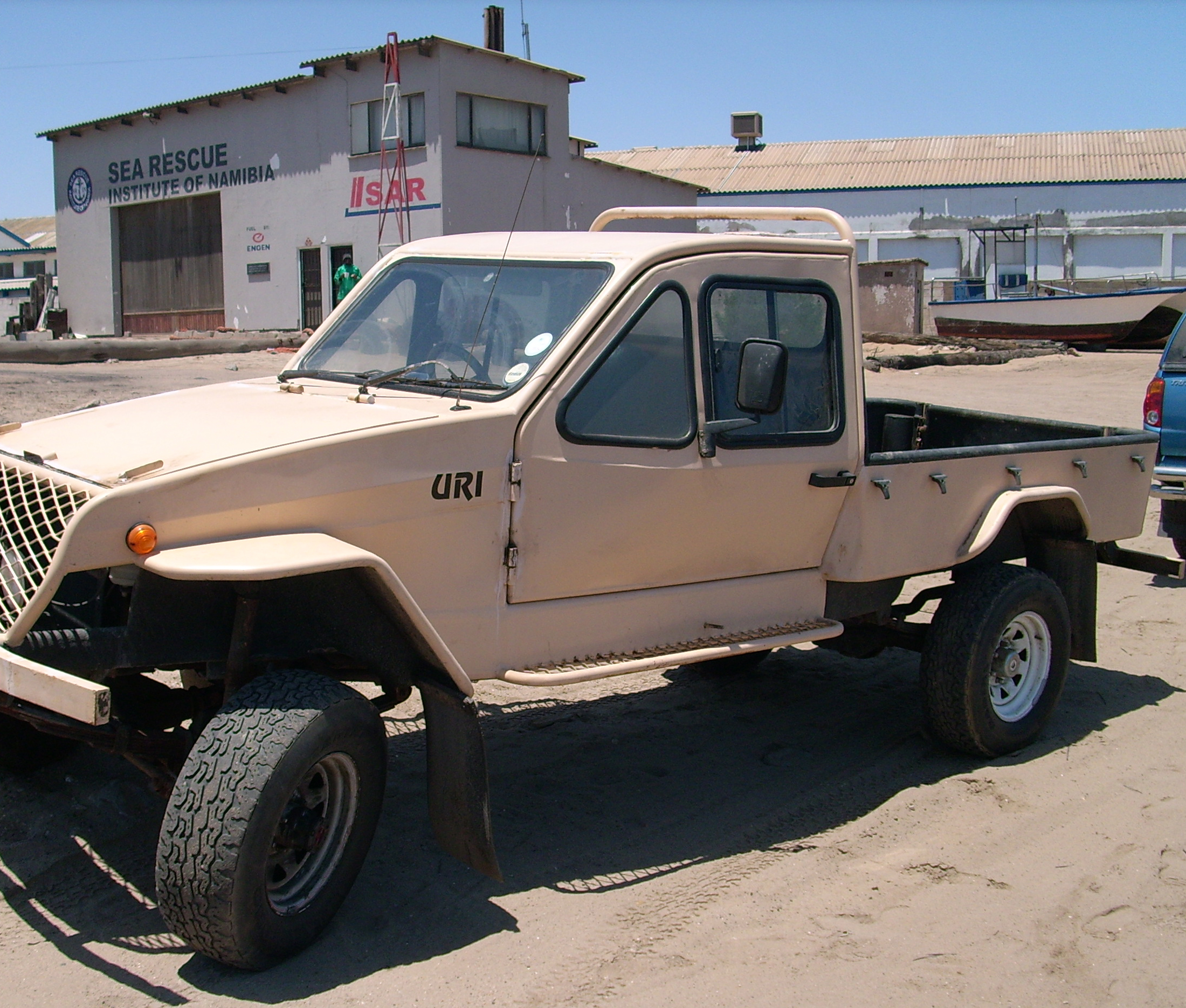 Uri-Automobile